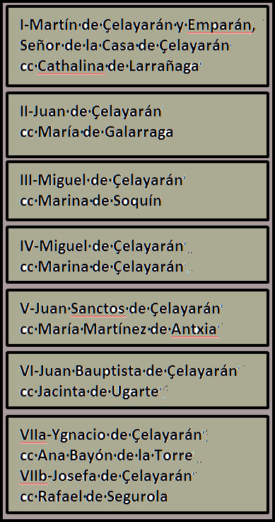 Esquema de la ascendencia de los Çelayarán y Ugarte